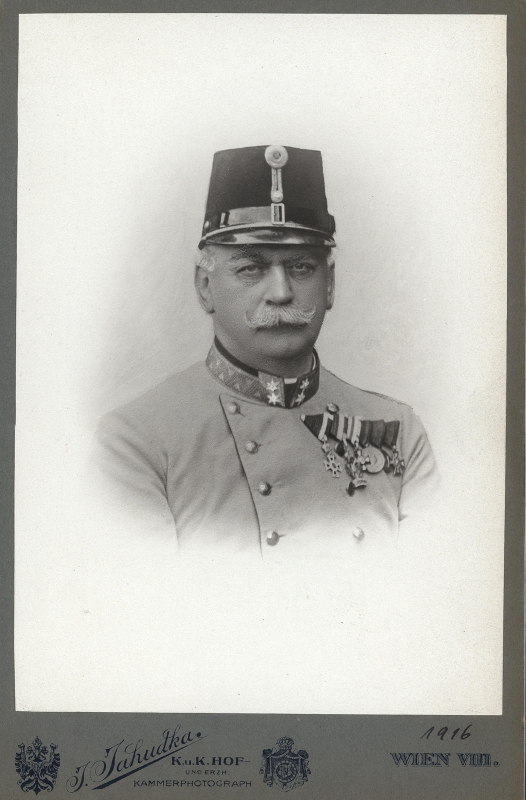 Anton Freiherr von Winzor (1844–1910) Governor of Bosnia and Herzegovina